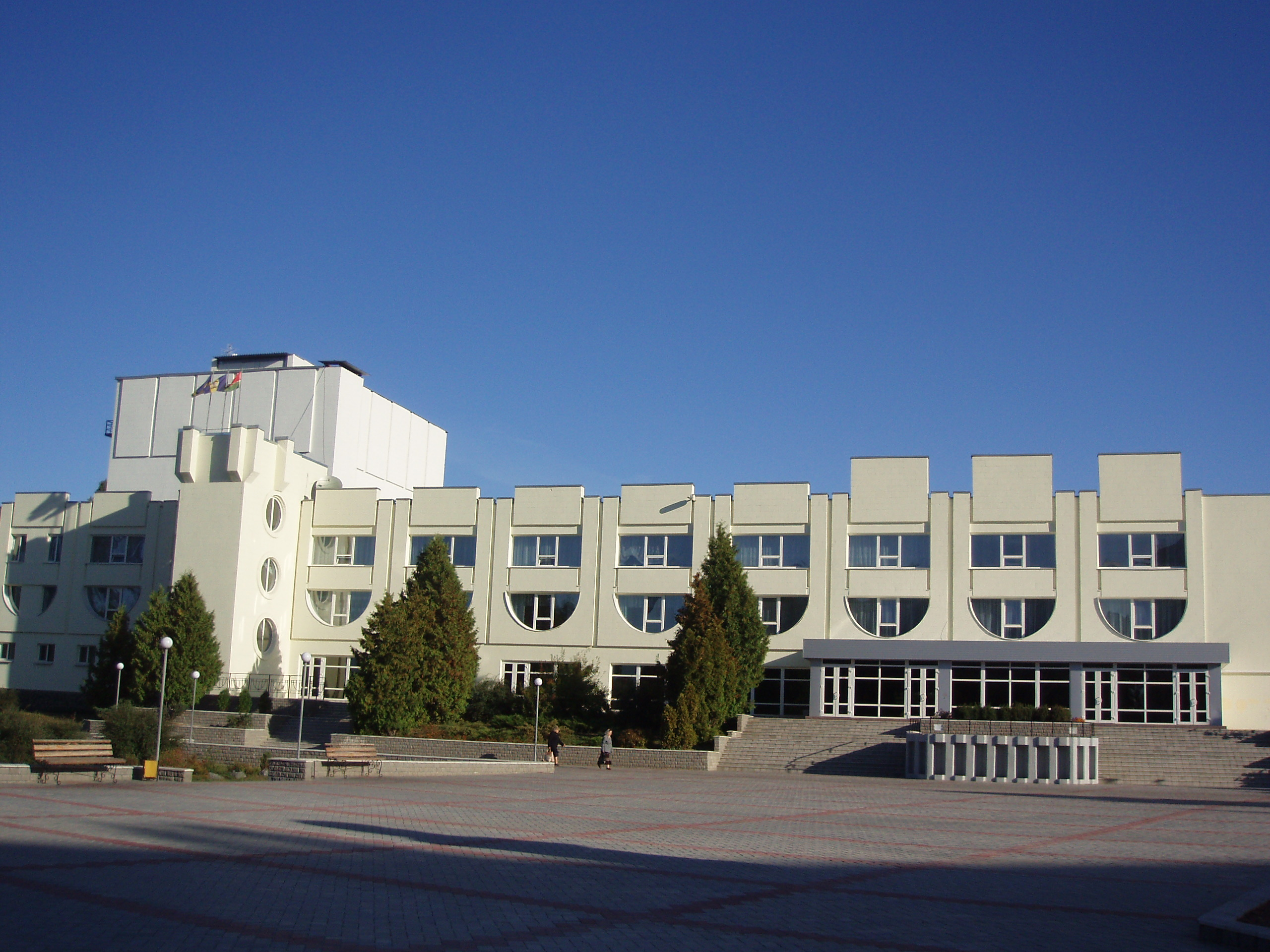 Бородянський районний будинок культури, вересень 2009 року